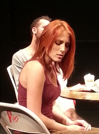 Lorena Del Castillo durante una presentación de Palomita Pop